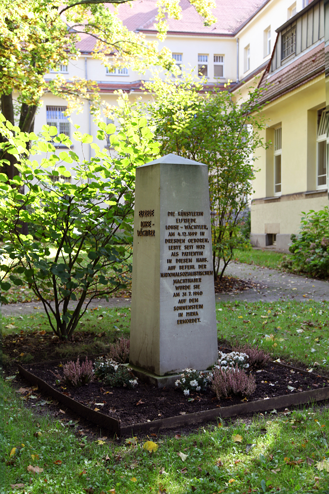 Sächsisches Krankenhaus Arnsdorf, Gedenkstein für Elfriede Lohse-Wächtler vor dem Haus B3